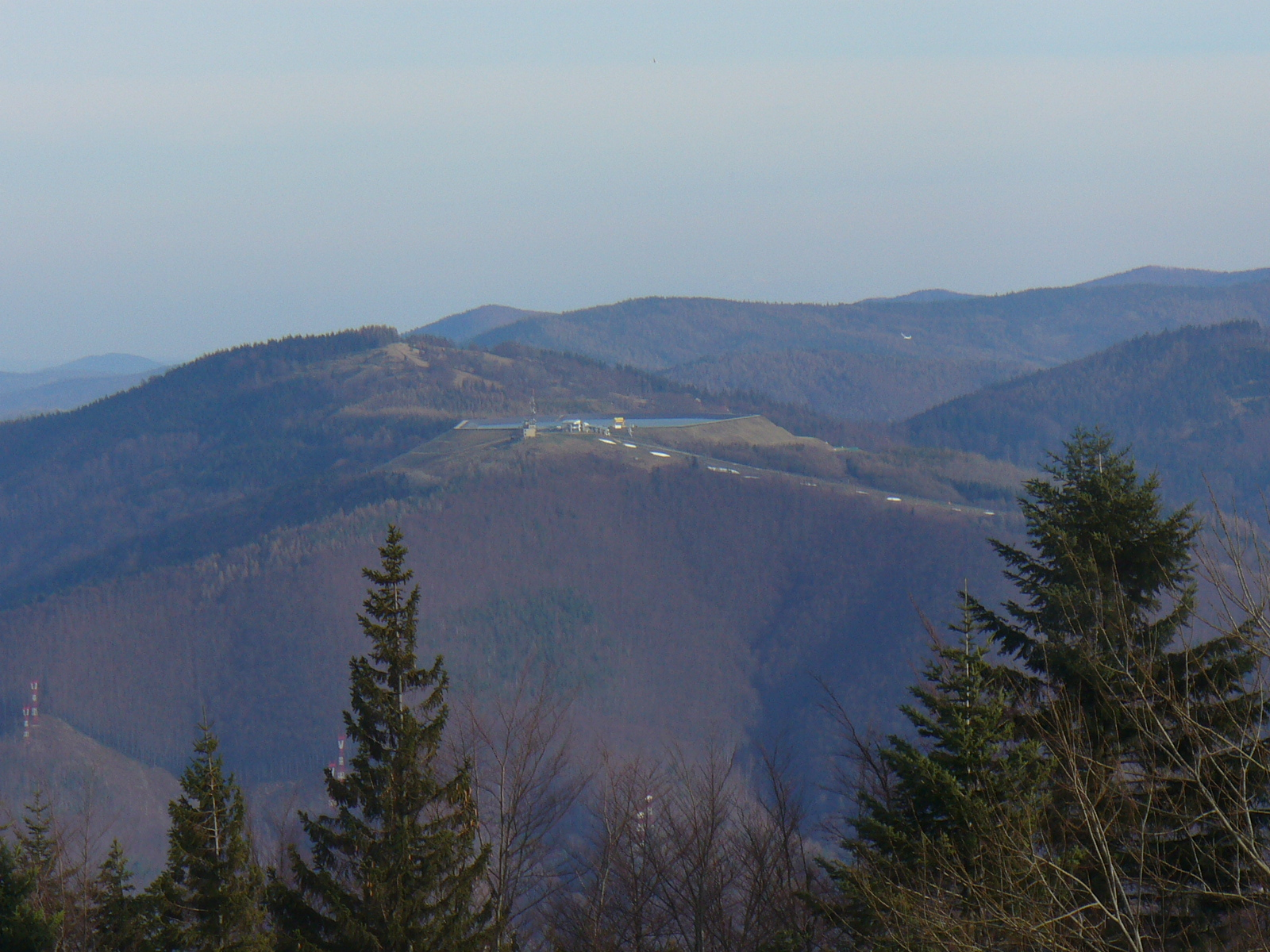 Góra Żar widziana z Magurki Wilkowickiej